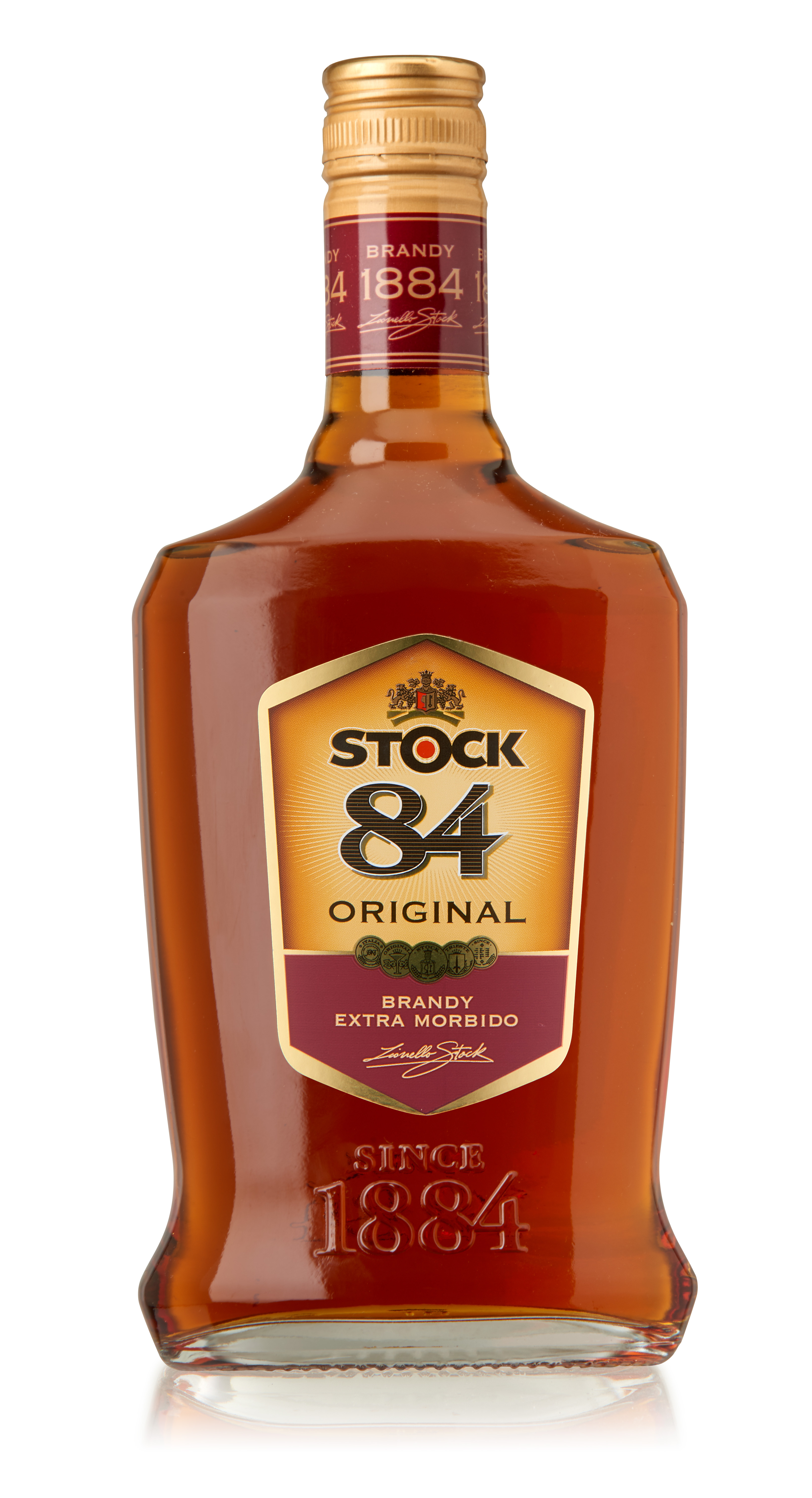 2017 : Stock original new pack % new bottle